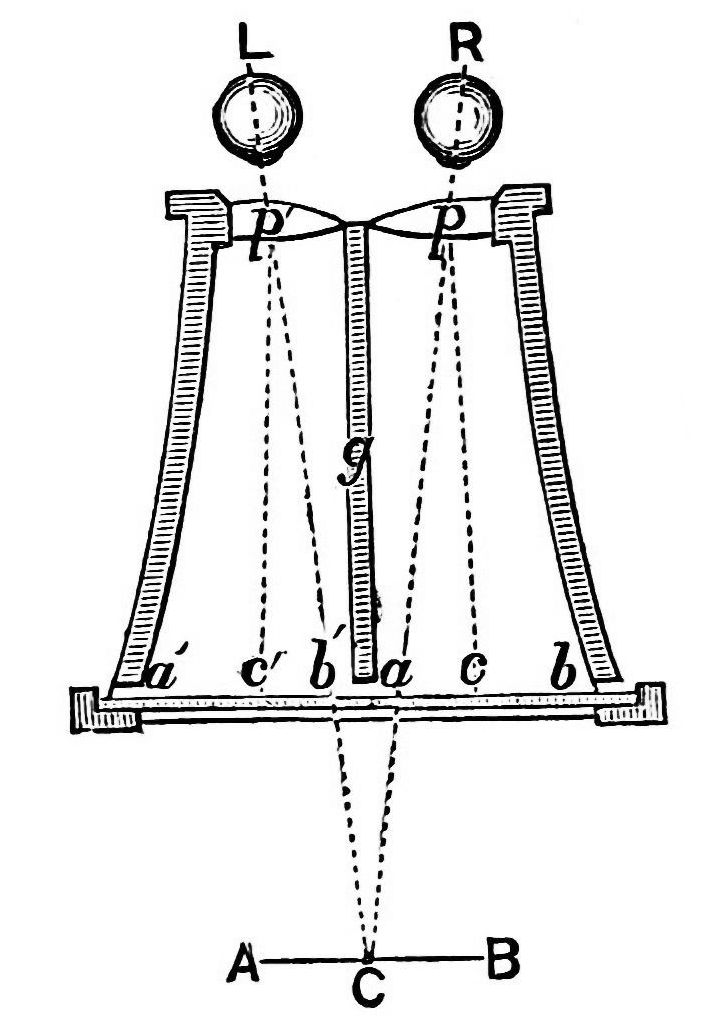 Visual triangulation